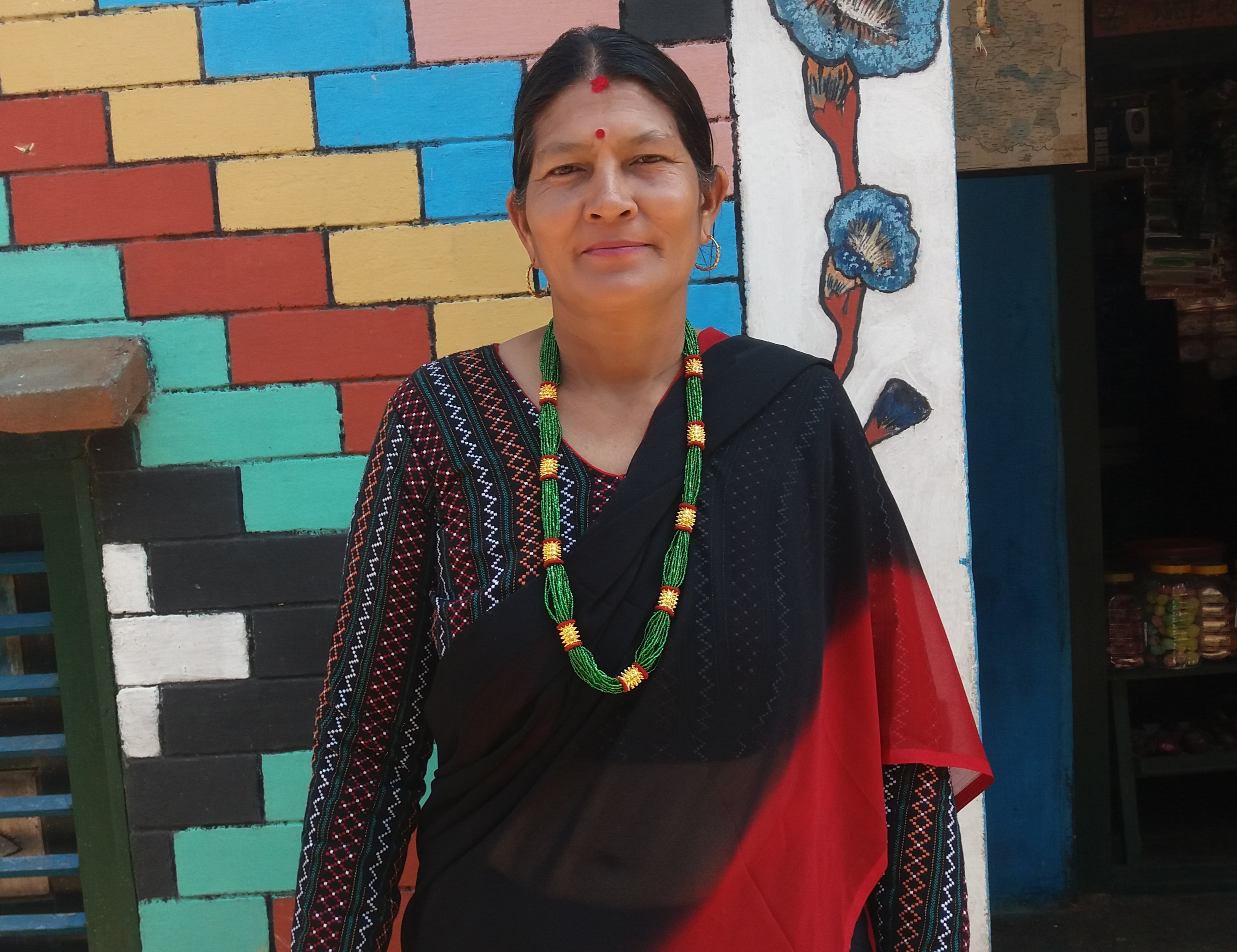 नेपाली: एक महिला नेवारी पोशाकमा